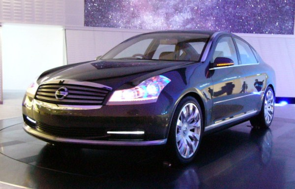 日産・フウガ 東京モーターショー2003にて撮影